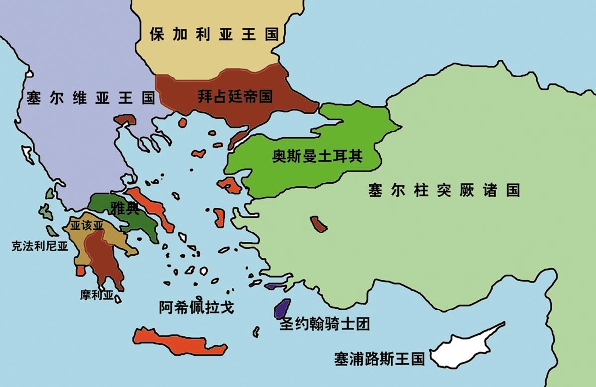 公元1355年时的zh:拜占庭帝国疆域